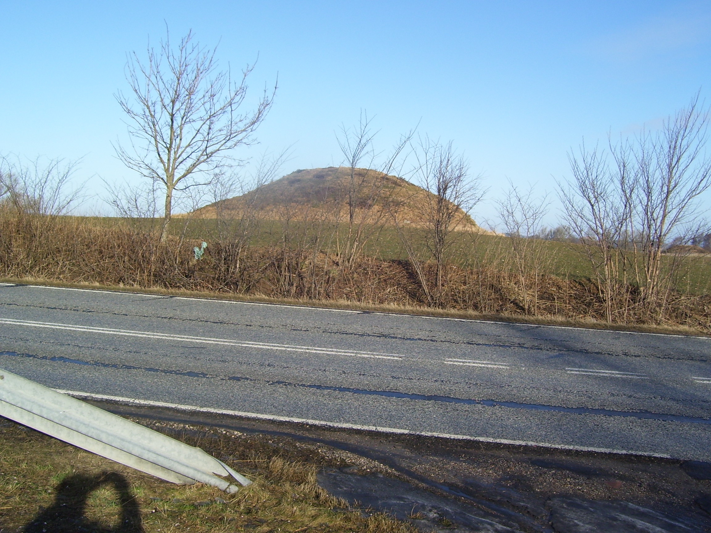 Gravhøj ved Ramløse